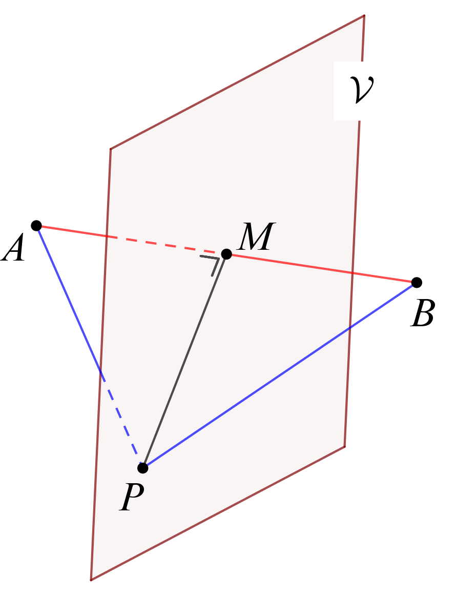 definitie